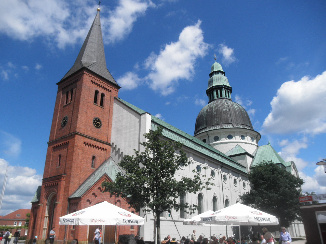 Kathedrale Emsland-Dom in Haren (Ems): die Südfassade unter blauem Sommerhimmel